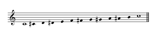 Description : Gamme chromatique Source : Personnelle Licence : GFDL